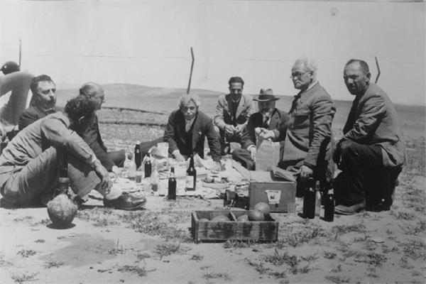 ביקור חברי הדריקטוריון בנגב - מר יוסף ויץ מר אברהם הרצפלד וד"ר אברהם גרנות